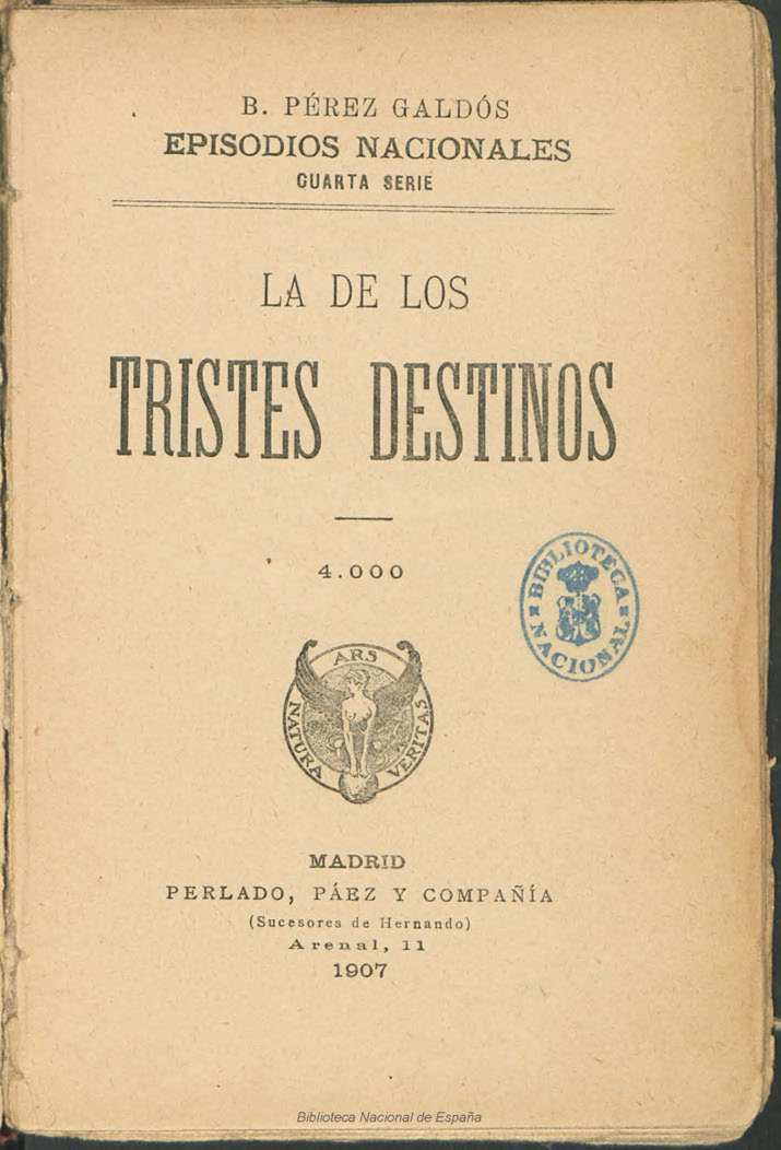 La de los tristes destinos Autor: Pérez Galdós, Benito (1843-1920) Fecha: 1907 Datos de edición: Madrid, Perlado, Páez y Compañía